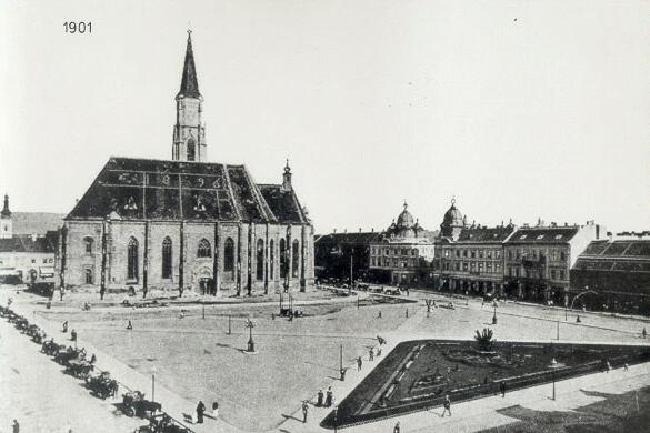 Kolozsvár főterén, 1901-ben, a jelenleg ismert Mátyás király szoborcsoport helyén egy jóval kisebb változat volt elhelyezve.